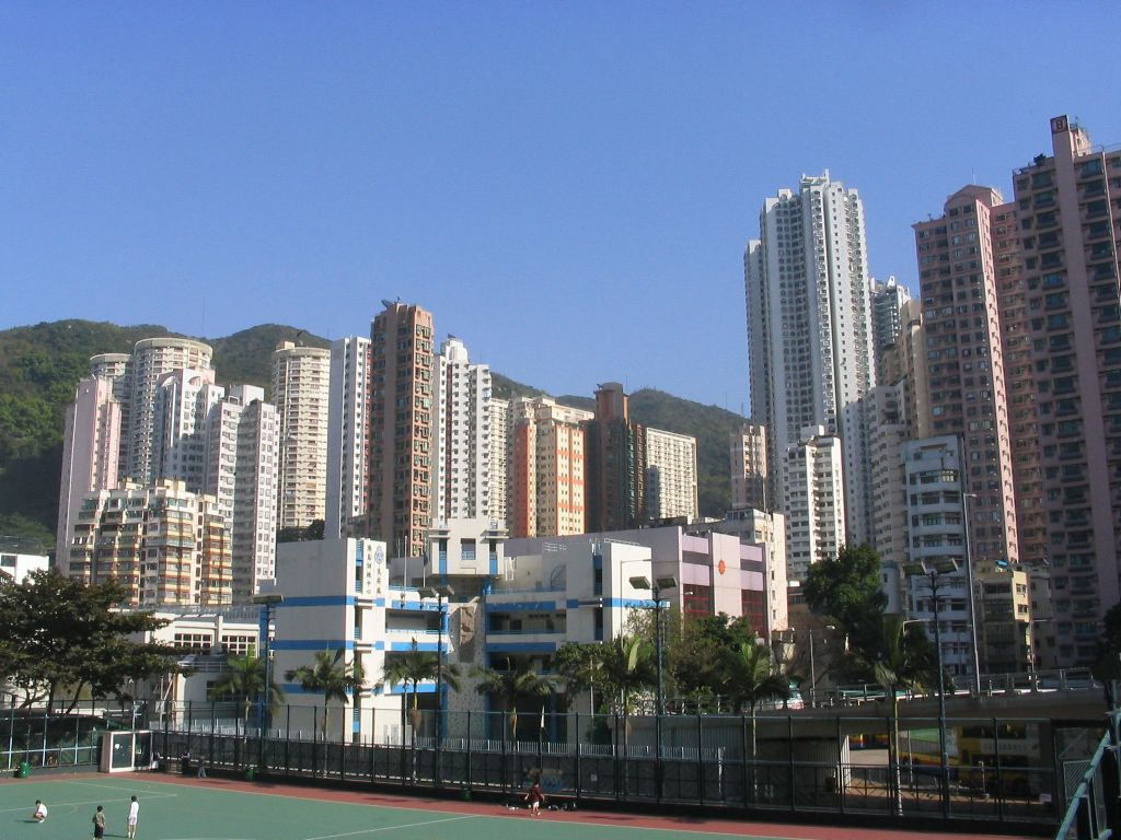 大坑 Tai Hang